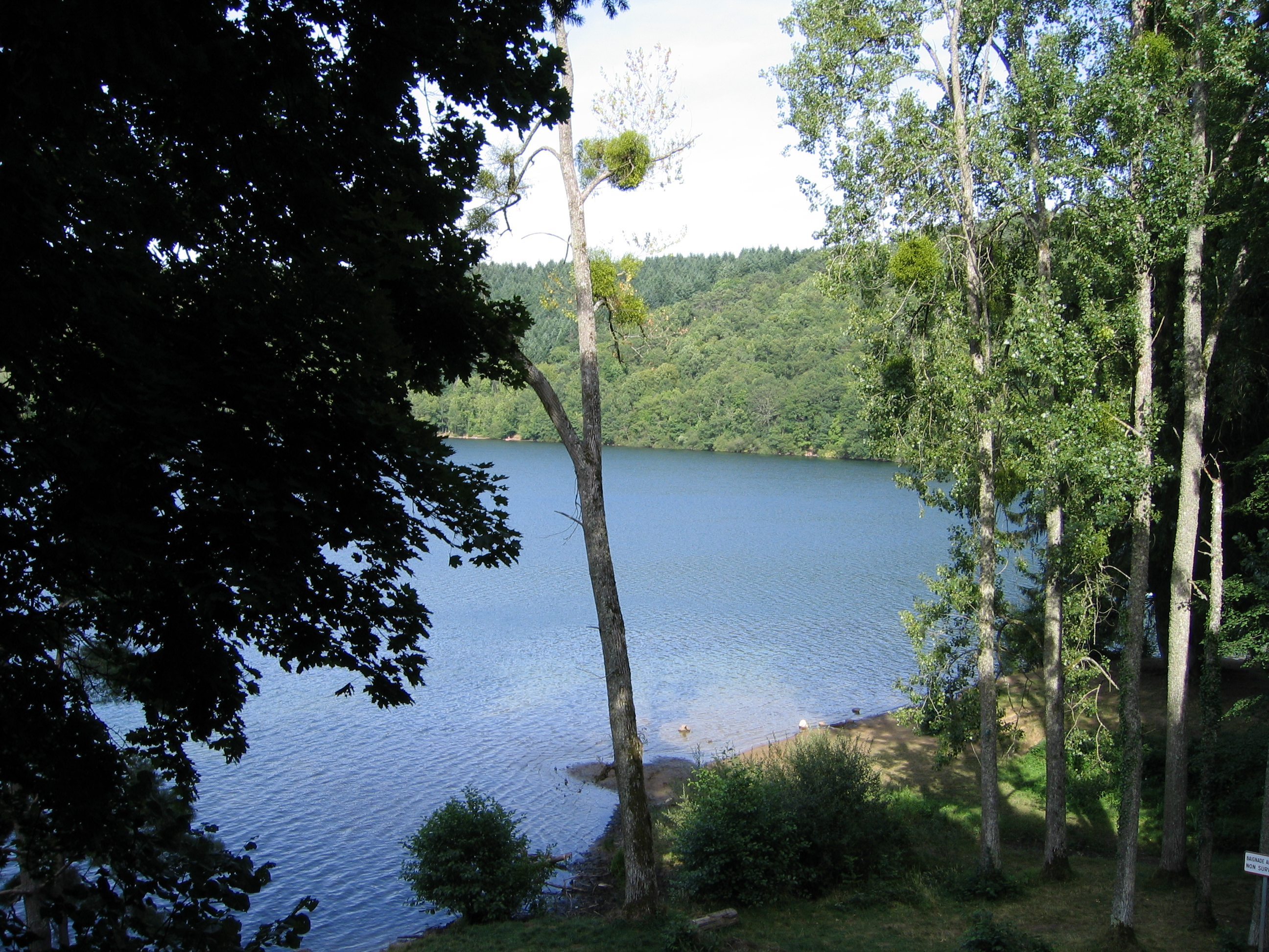 Le Gour de Tazenat (Commune de Charbonnières-les-Vieilles, Puy-de-Dôme, Région auvergne)